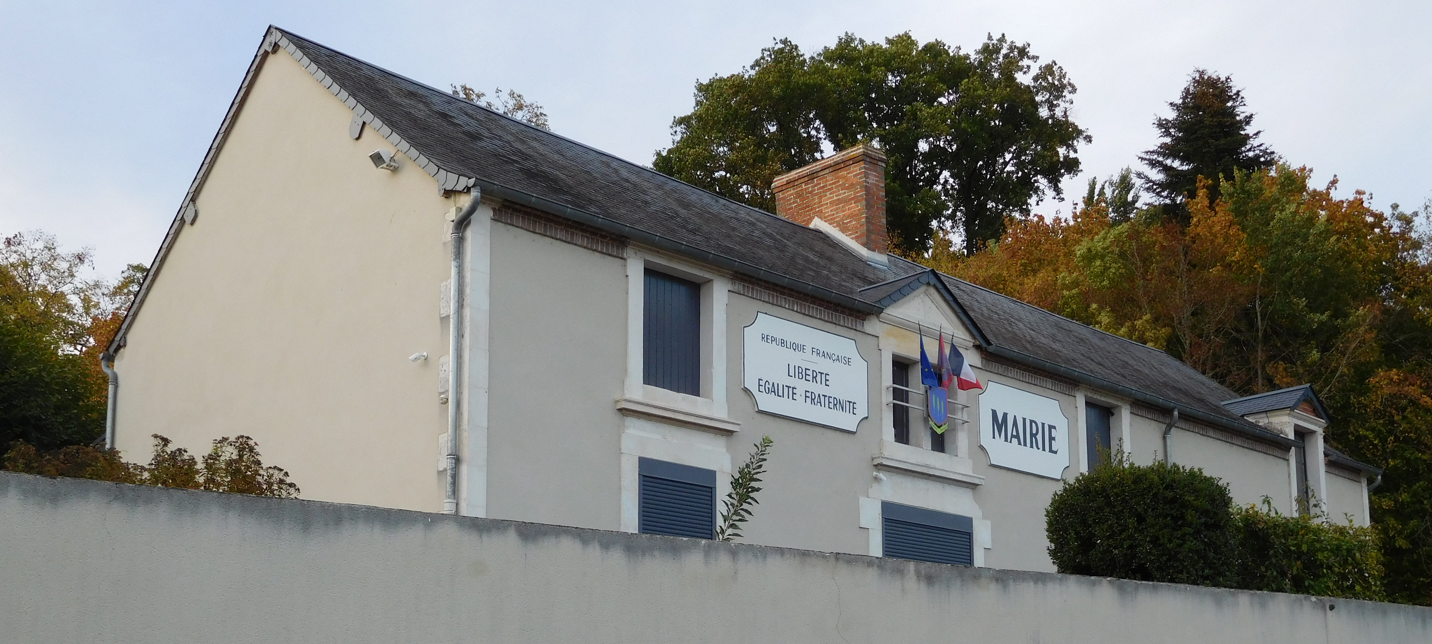 Mairie de Bannay, Cher, France.